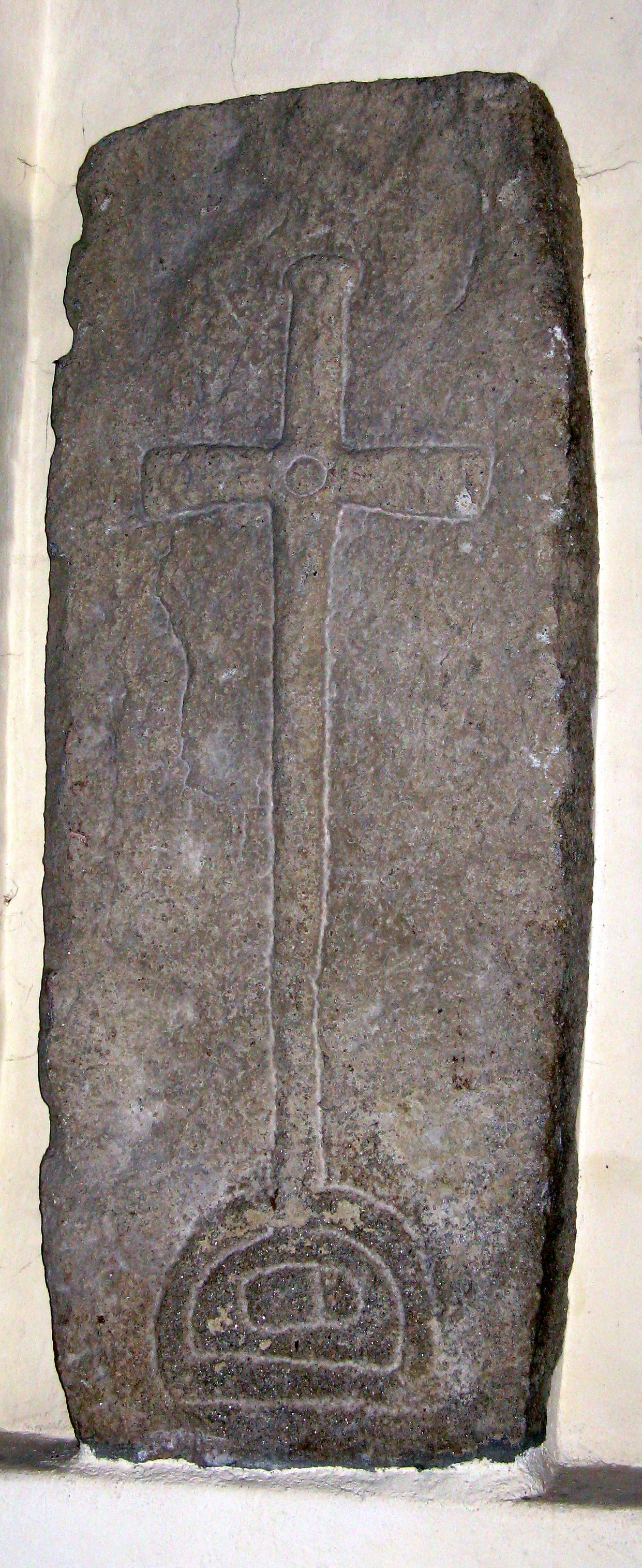 Grabplatte aus dem 11./12. Jahrhundert, ist in der Pfarrkirche Pergkirchen fix eingemauert.